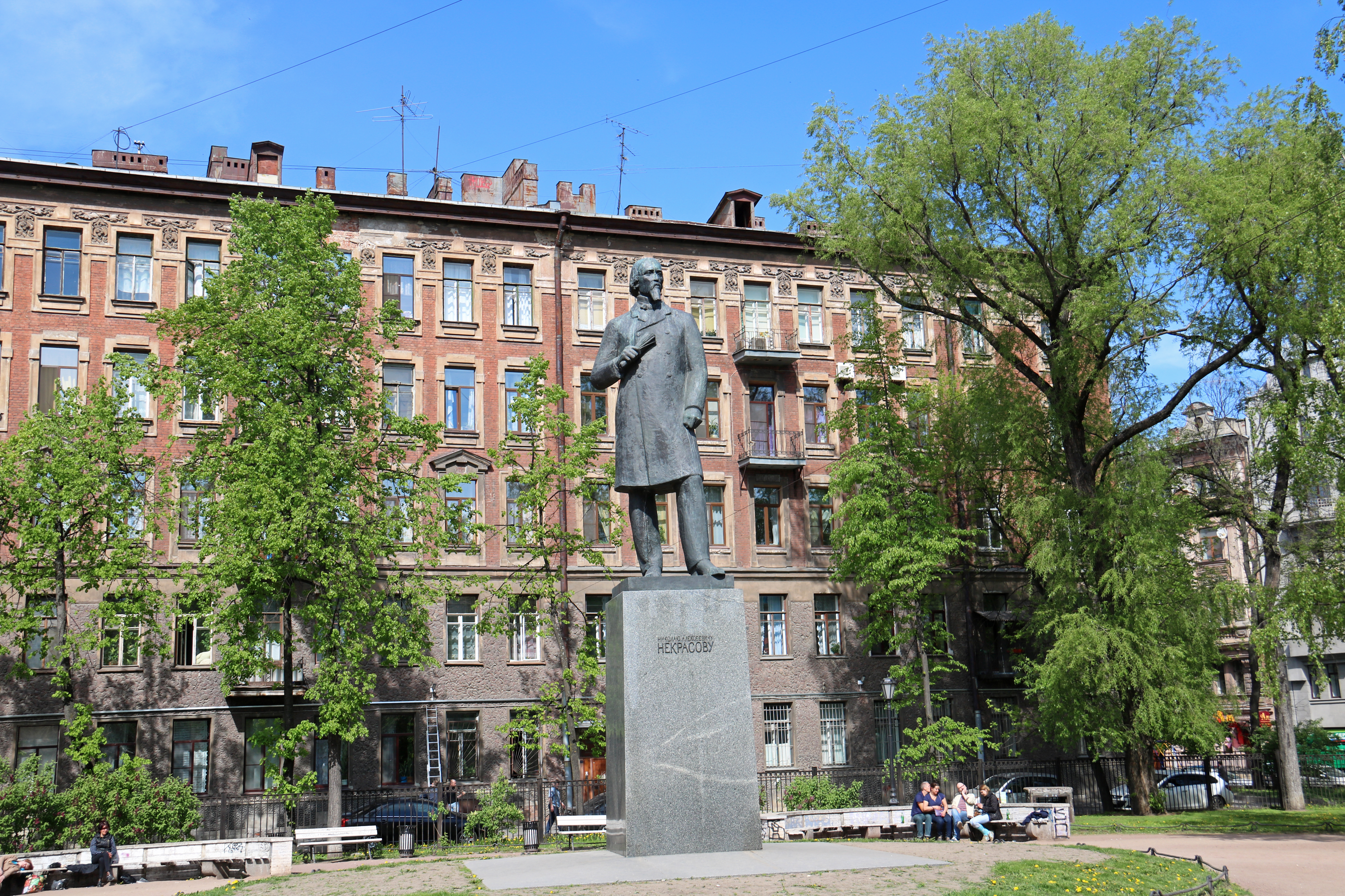 Греческий сад с территорией: Греческий проспект, 8, Прудковский переулок, 1-3, Центральный район, Санкт-Петербург